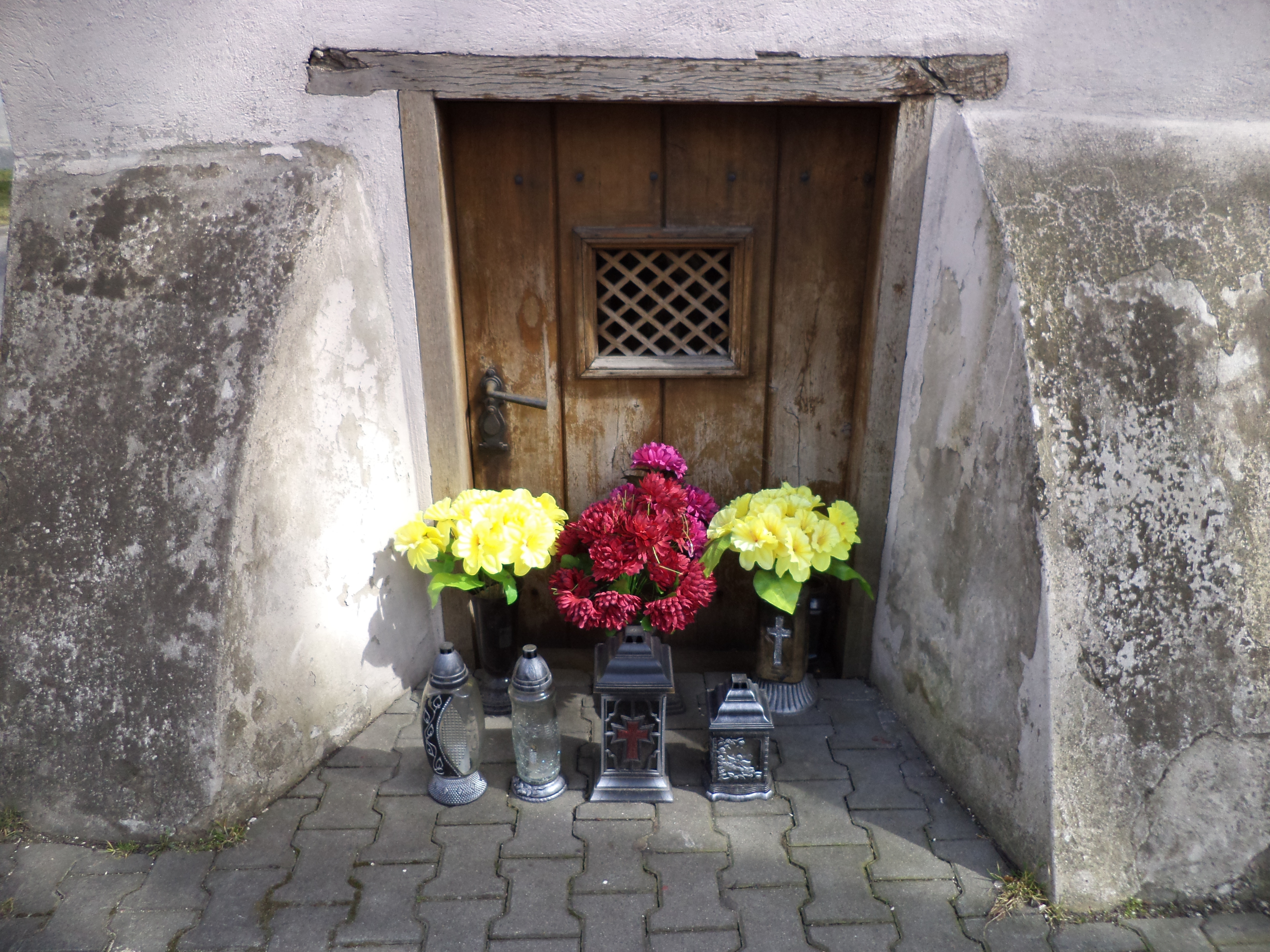 Drzwiczki zabytkowej kapliczki z XIX wieku przy ulicy Głównej w Tarnowskich Górach-Bobrownikach Śląskich